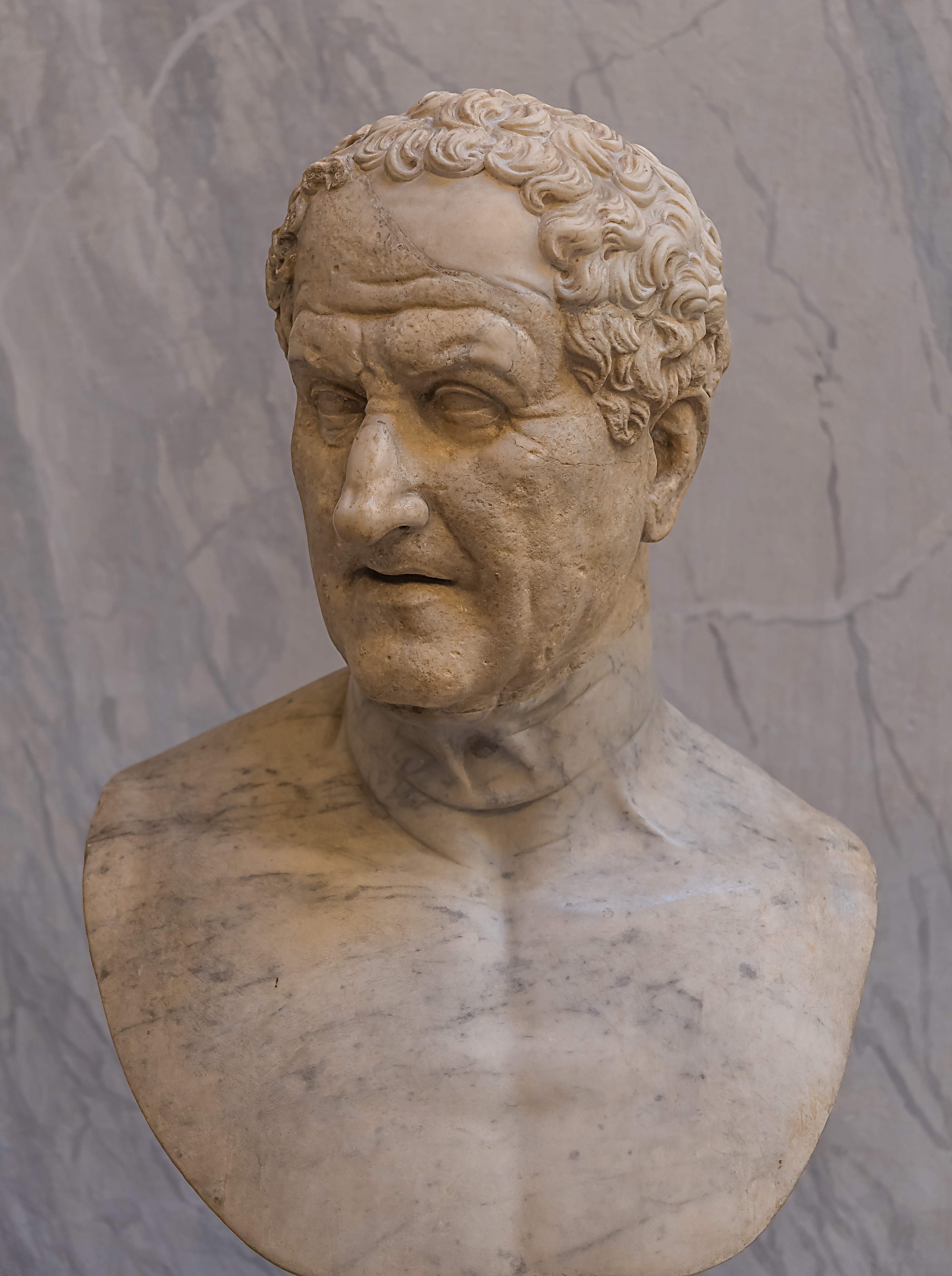 Restauriertes Porträt von Aulus Postumius Albinus (Konsul 99 v. Chr.) auf moderner Büste. Wahrscheinlich wurde das aus dem Palazzo Ruspoli stammende Originalporträt zwischen den Jahren 70 bis 100 n. Chr. überarbeitet. Jetzt ausgestellt in den Vatikanischen Museen